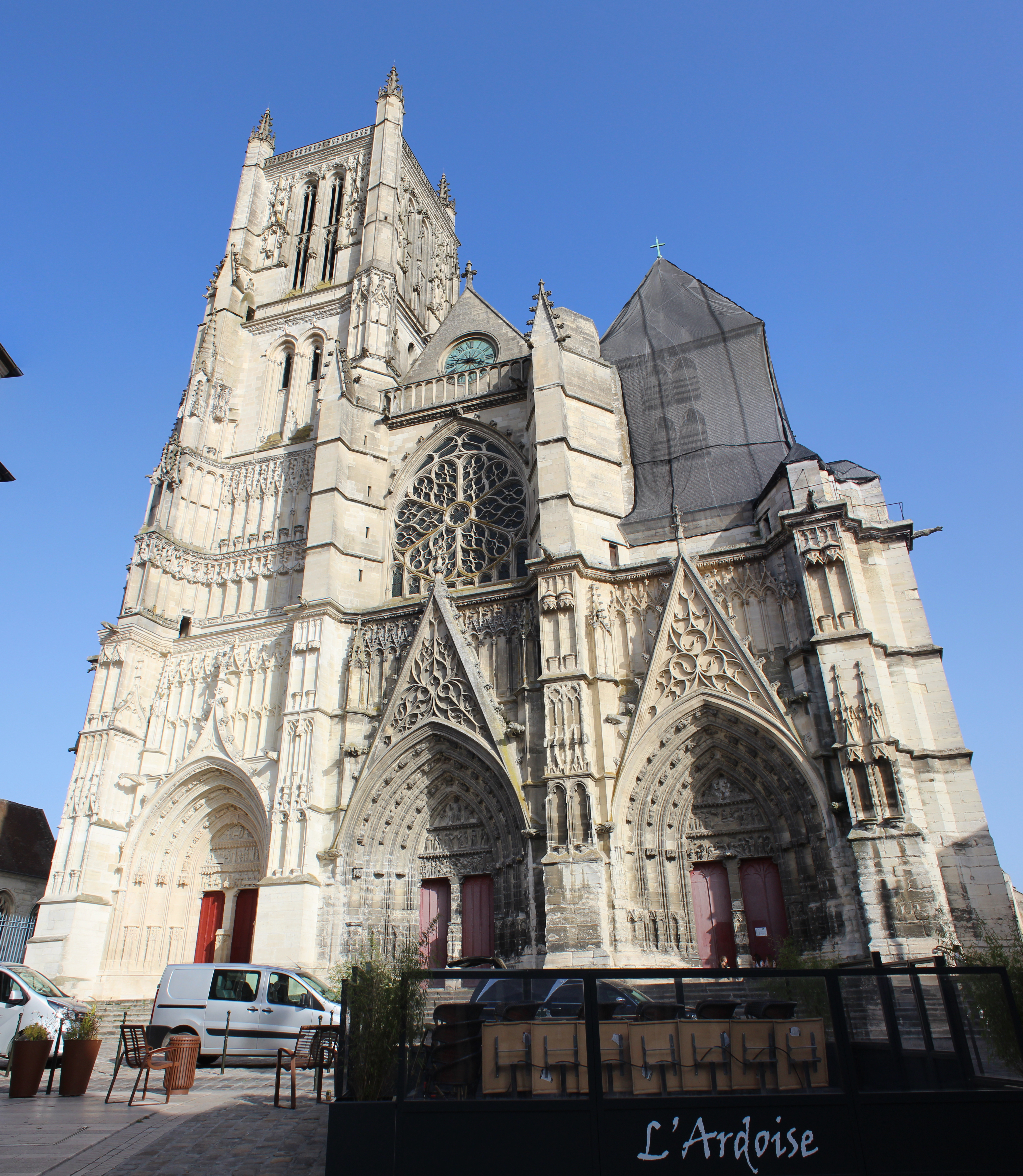 Façade ouest de la cathédrale Saint-Étienne de Meaux.